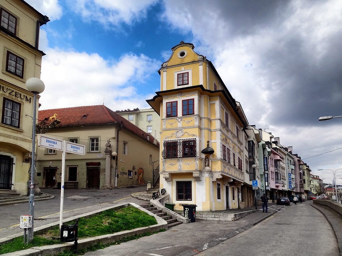 Еврейская улица